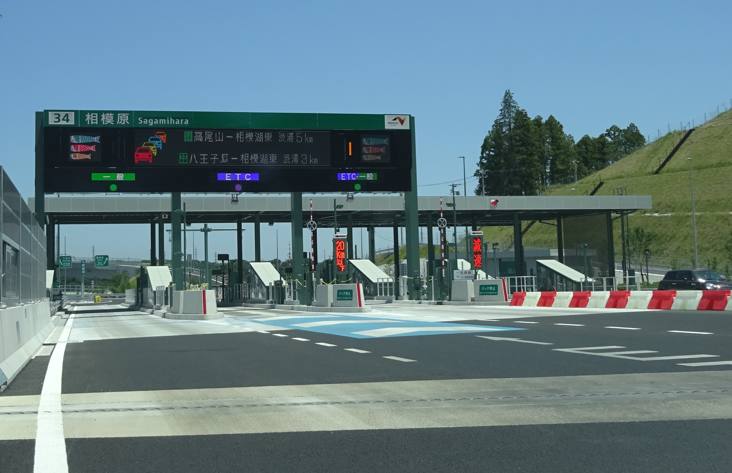 相模原インターチェンジ